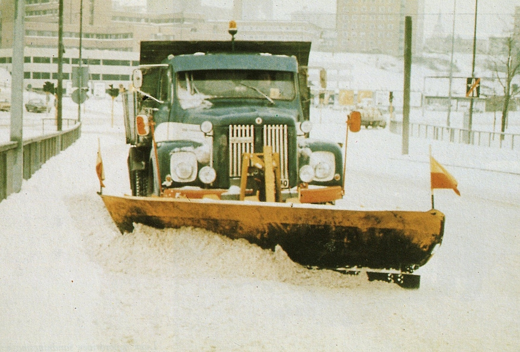 Plogbil i Stockholm. Kungsholmen, på nuvarande Kristinebergspåfarten till Essingeleden med riktning mot korsningen Kellgrensgatan/Lindhagensgatan, kort efter införandet av högertrafik 1967. Jmf denna diskussion.